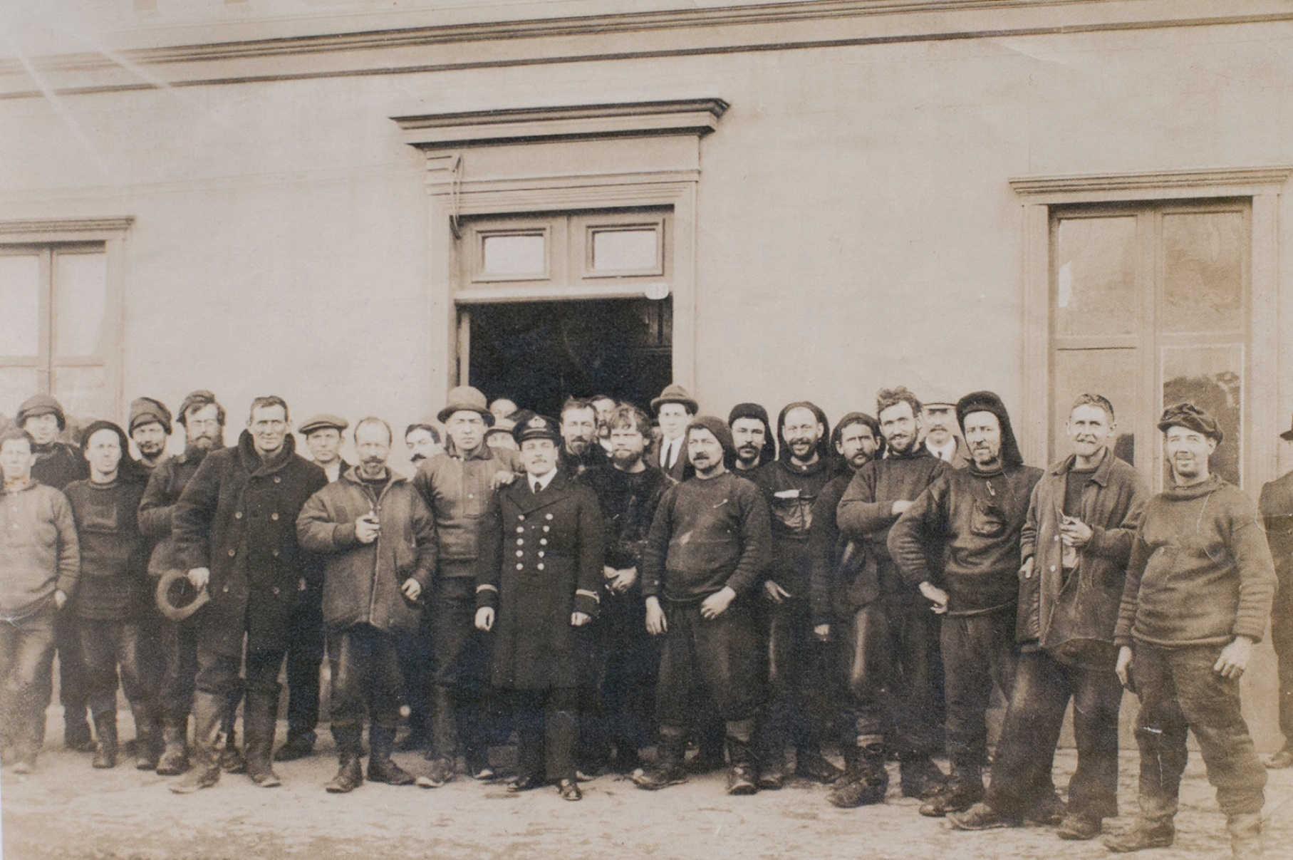 Luis Pardo y los británicos rescatados luego de su llegada a Punta Arenas, en la puerta del Hotel Royal.